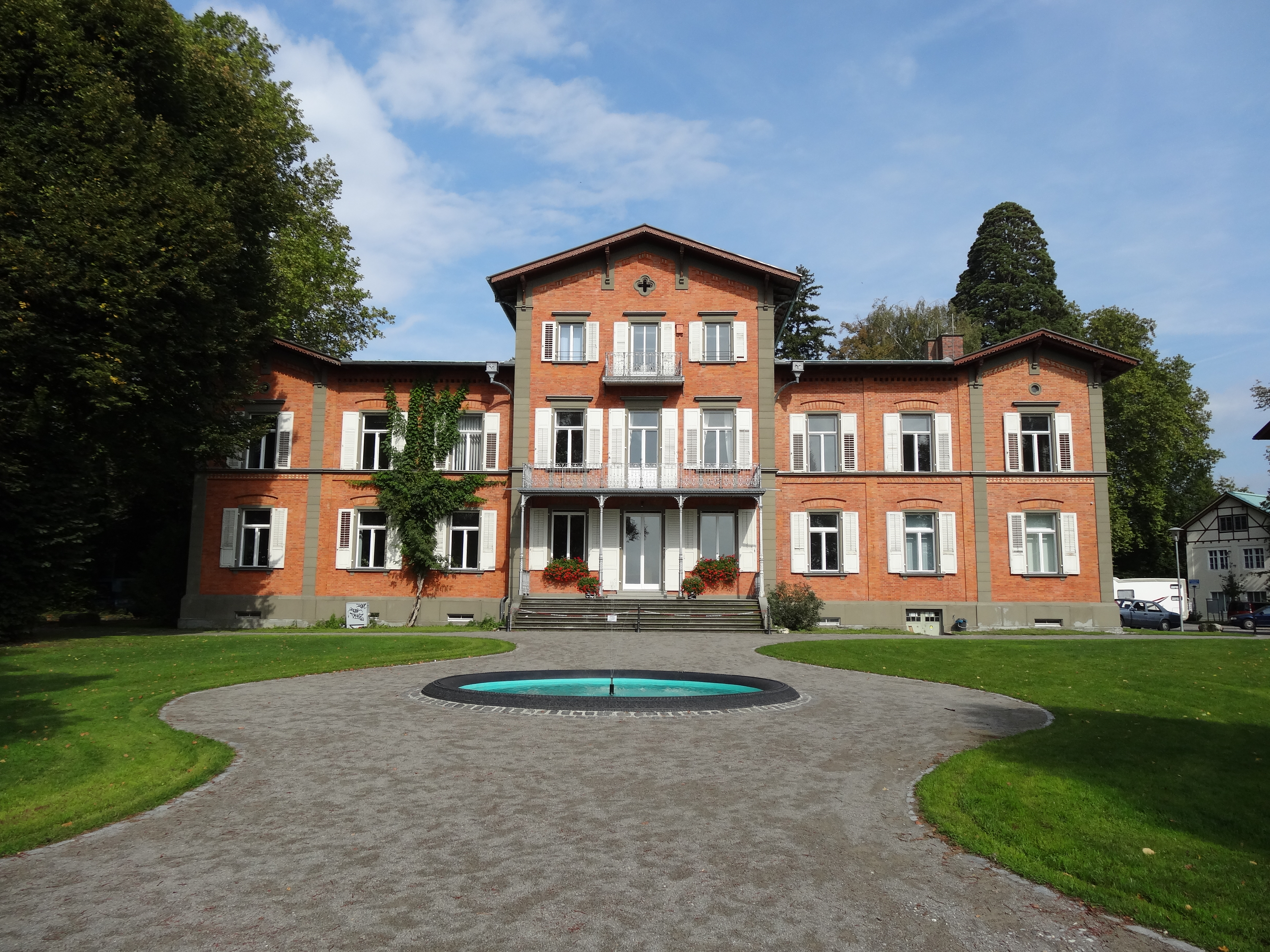 Villa Toskana in Lindau (Bodensee), heutige Stadtverwaltung vom See gesehen. Die Villa war Sommersitz des nicht mehr regierenden Großherzog Ferdinand IV. Österreich-Toskana This is a photograph of an architectural monument.